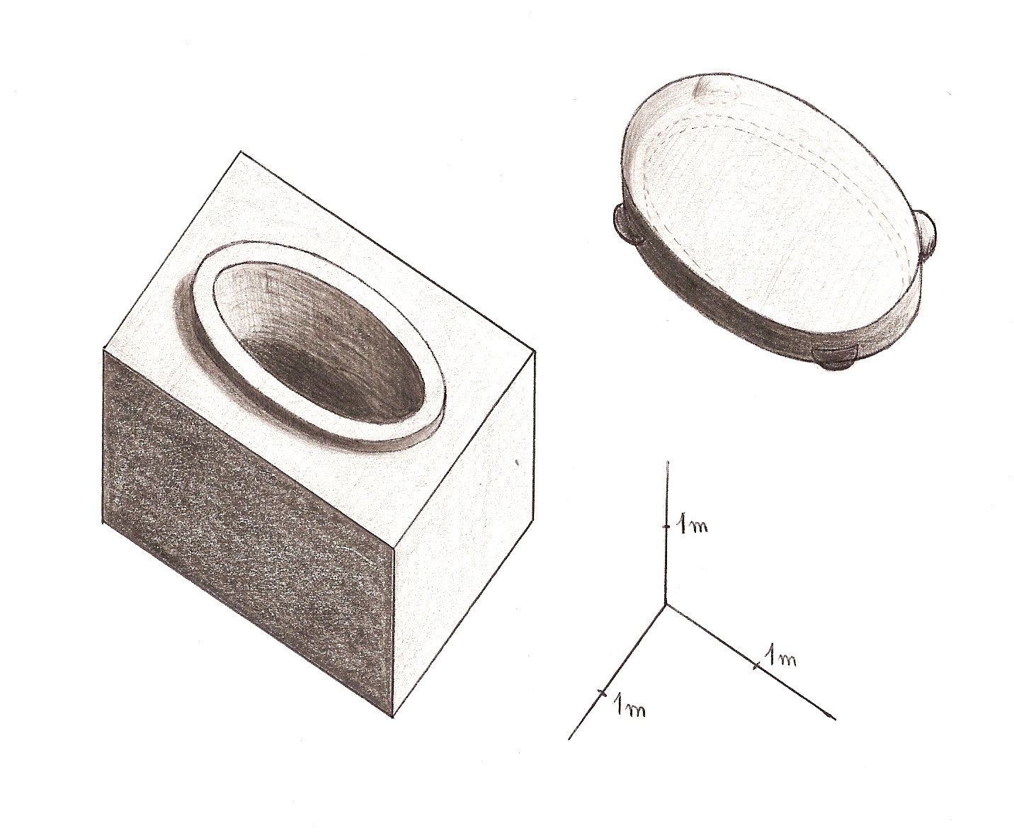 Sarcophage de la grande excavation de zaouiet el-aryan